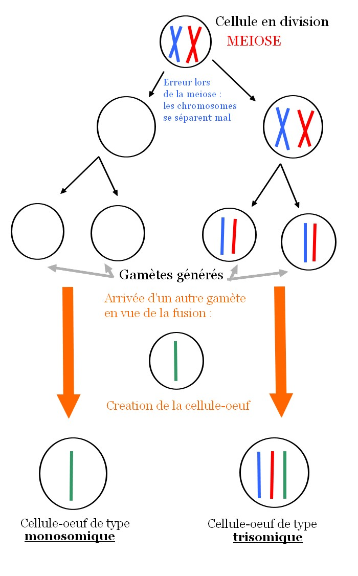 Décrit comment une celle-oeuf de type monosomique ou trisomique est générée.